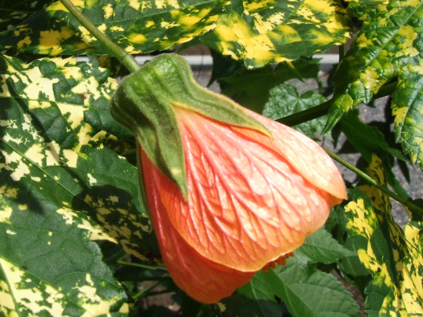 Abutilion pictum 'Thompsonii'